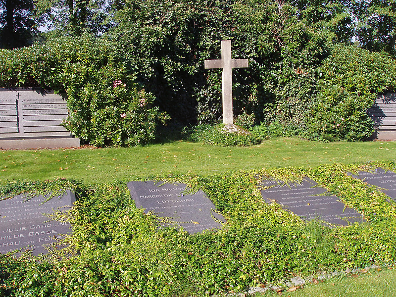 da: Tjele gods, Lüttichaus_familegravsted ved Tjele Kirke. Den ligger i Tjele Sogn, Sønderlyng Herred, Viborg Amt, Denmark